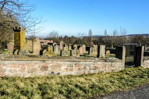 Judenfriedhof Steinbach 2